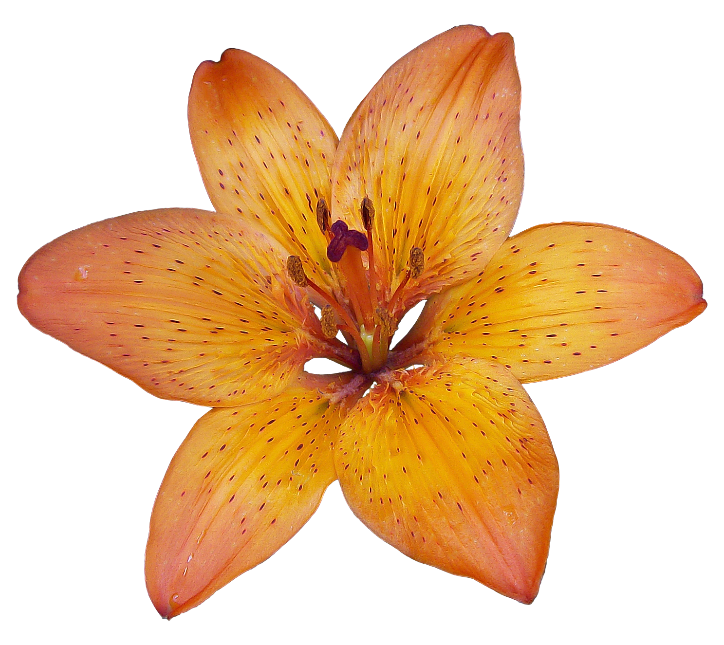 Flora Lilium bulbiferum ssp. croceum, ex coll. Monte Adone, Bologna, Italia